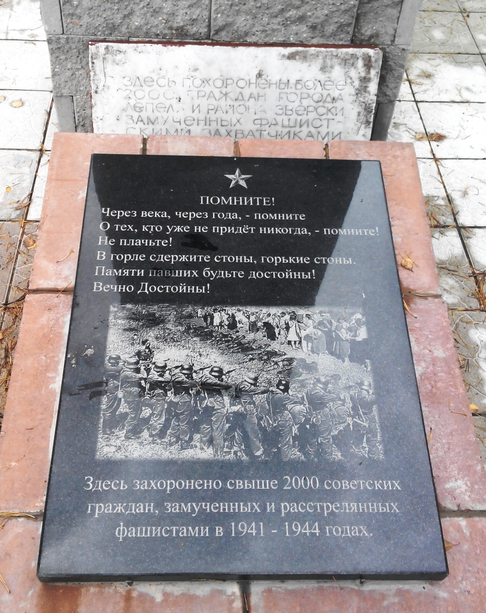 Памятник 1975 года около деревни Черноручье на братской могиле евреев - узников Лепельского гетто, убитых 28 февраля 1942 года.